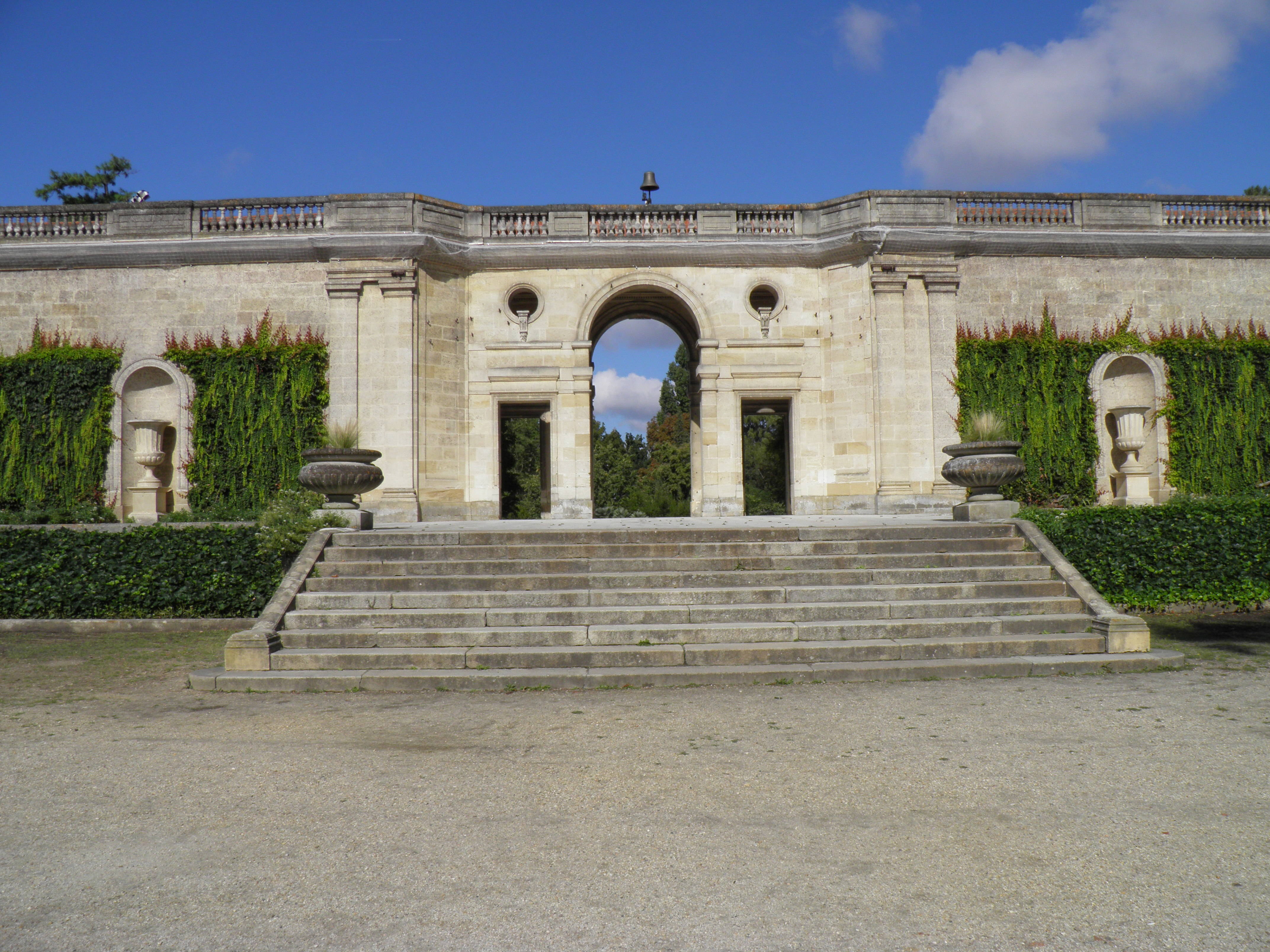 Jardin public à Bordeaux (Gironde, France).